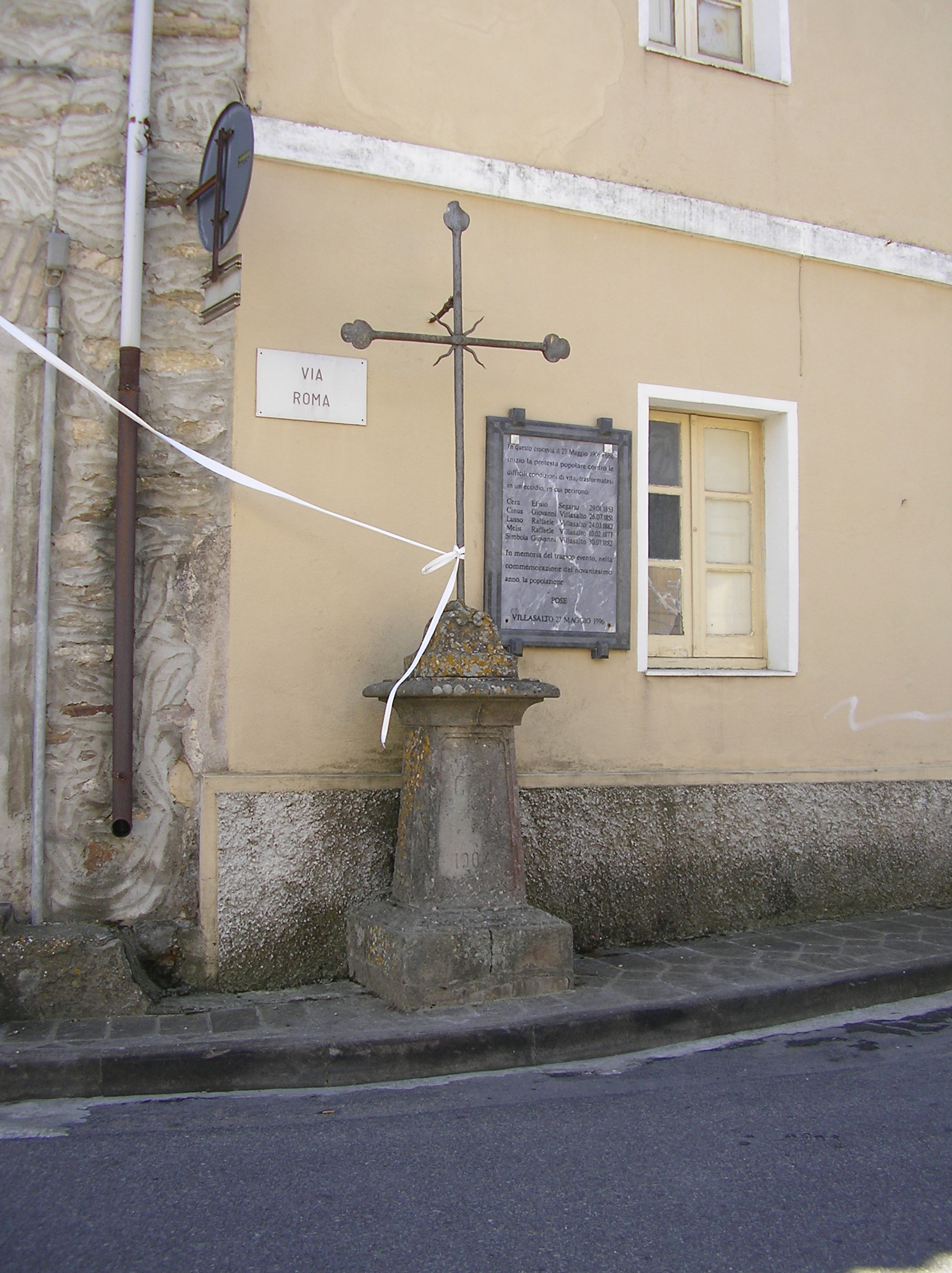 sa cruxi santa